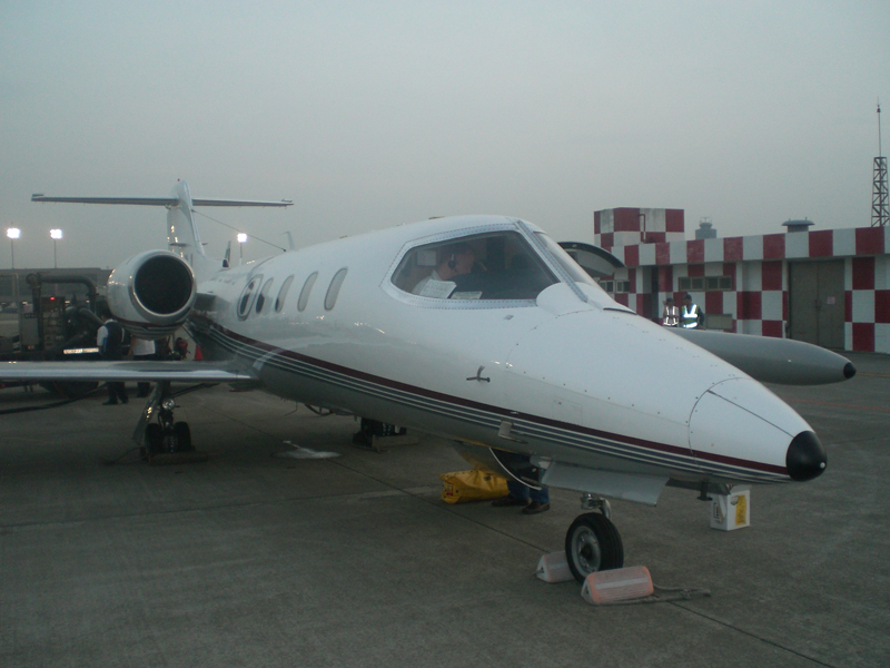 Learjet 36 at Macau Airport